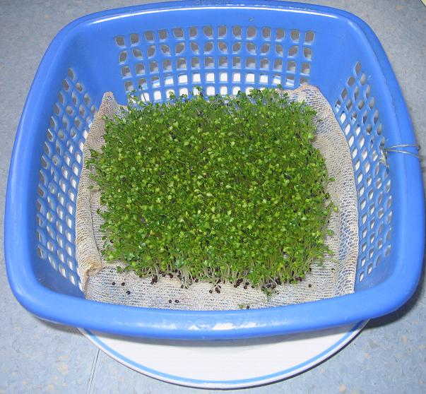 Rau cải mầm trồng trong giá nhựa, không đất, đặt trên đĩa nước, khoảng 4 ngày tuổi. Tôi chụp.